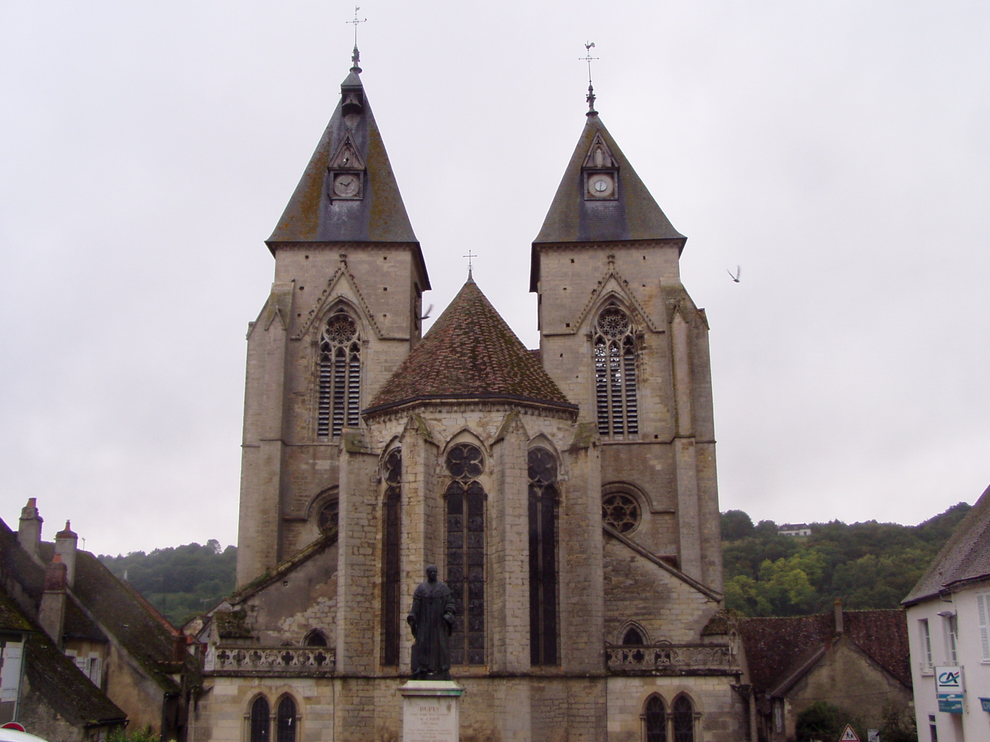 Église Saint-Pierre, Varzy (Nièvre). Vue de l'Est depuis la place du Marché / rue Delangle. Statue d'André Dupin en premier plan. Sur l'escarpement en arrière-plan, la première maison du hameau de Bordafaux. Une antenne-relai est cachée par l'église.